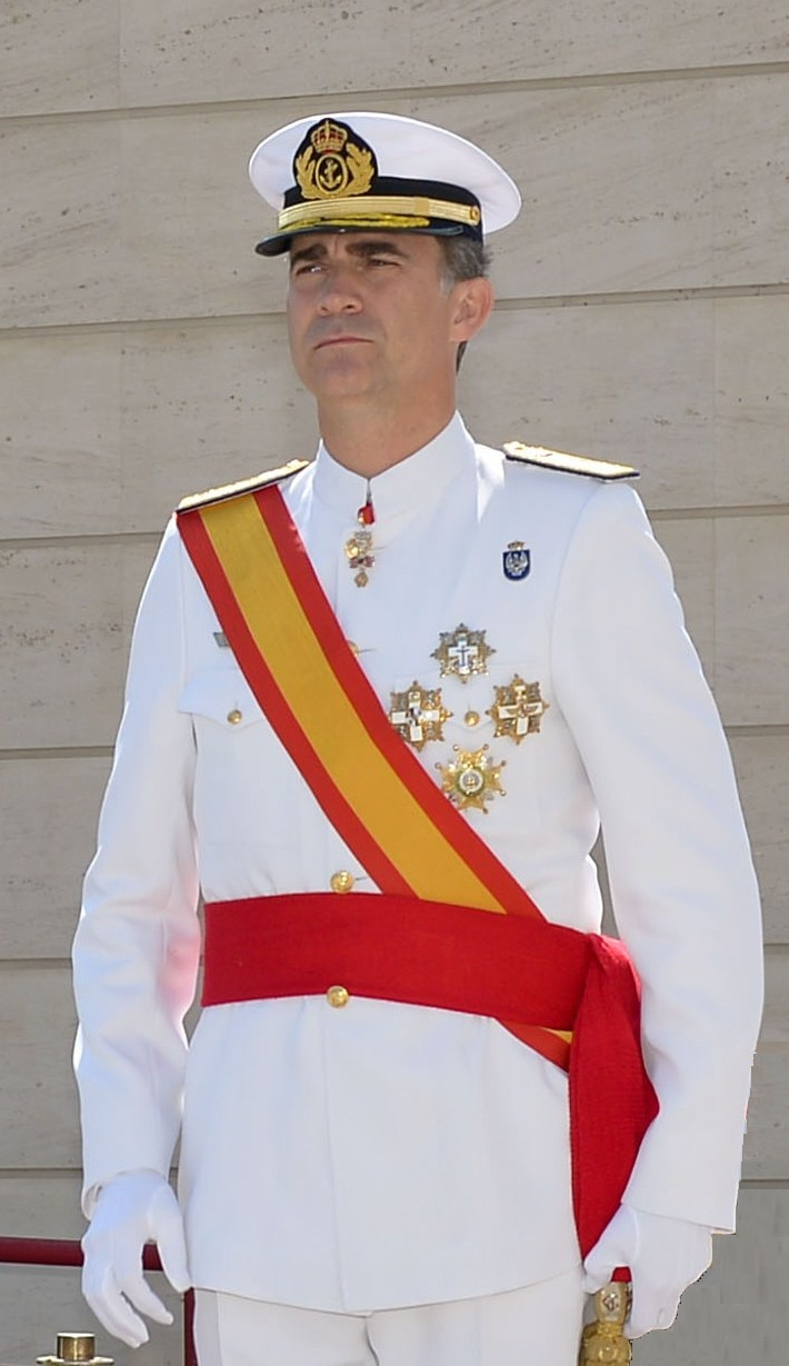 14.07.11-Escuela Marina-1-San Fernand-edit